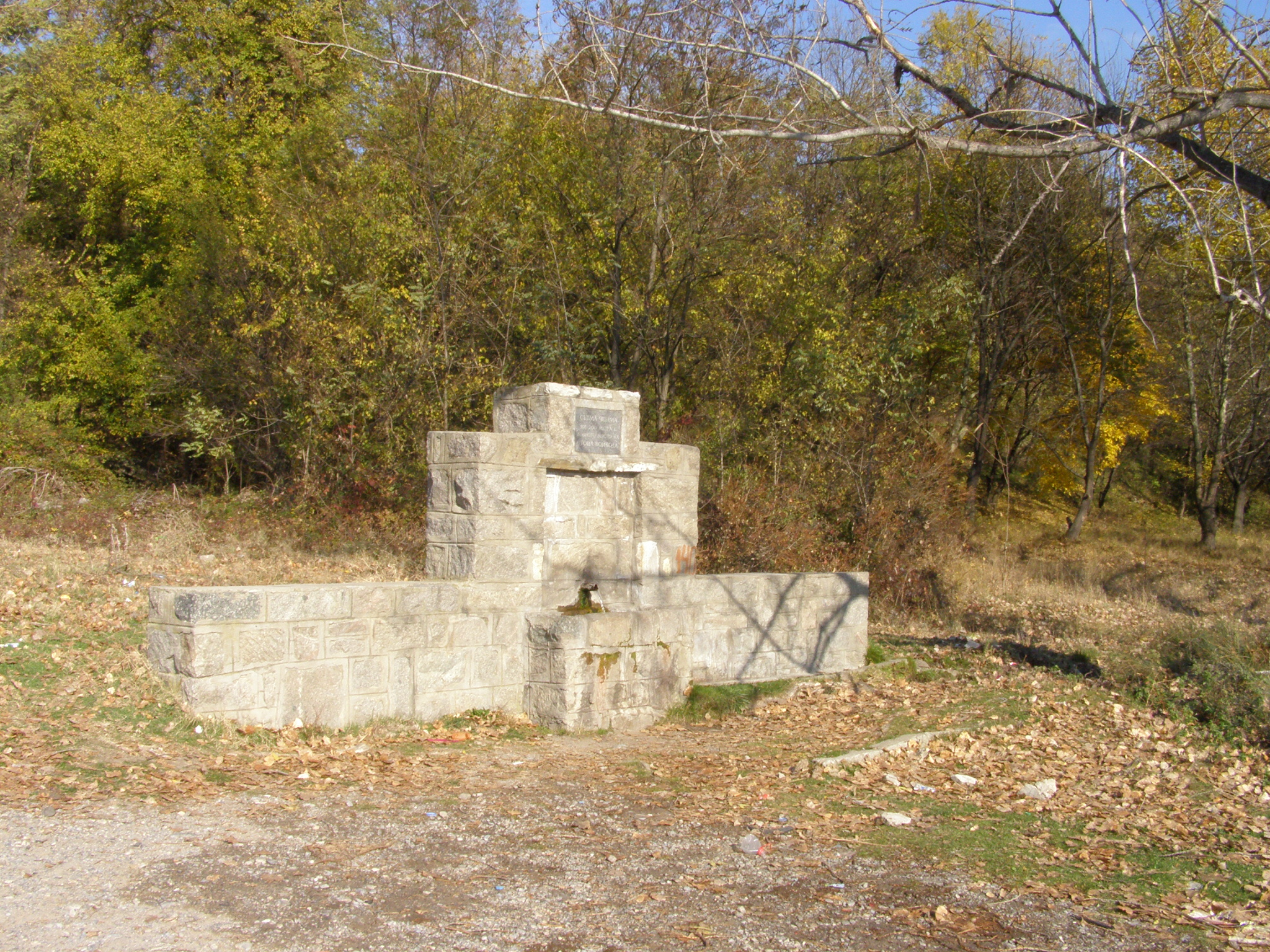 На тази снимка е чешма-паметник на Стойл Войвода край с.Бинкос ( община Сливен)